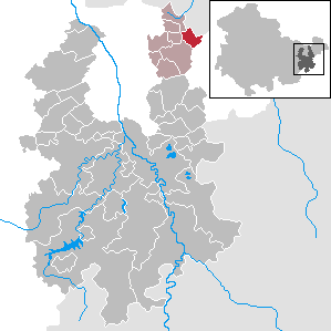 Reichstädt in Thuringia - District Greiz